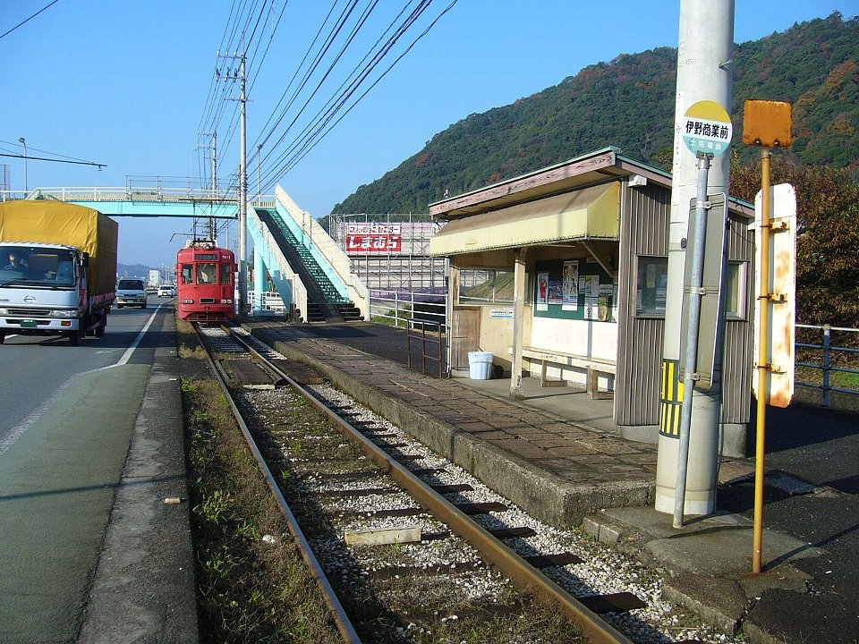 伊野線ja:伊野商業前停留場